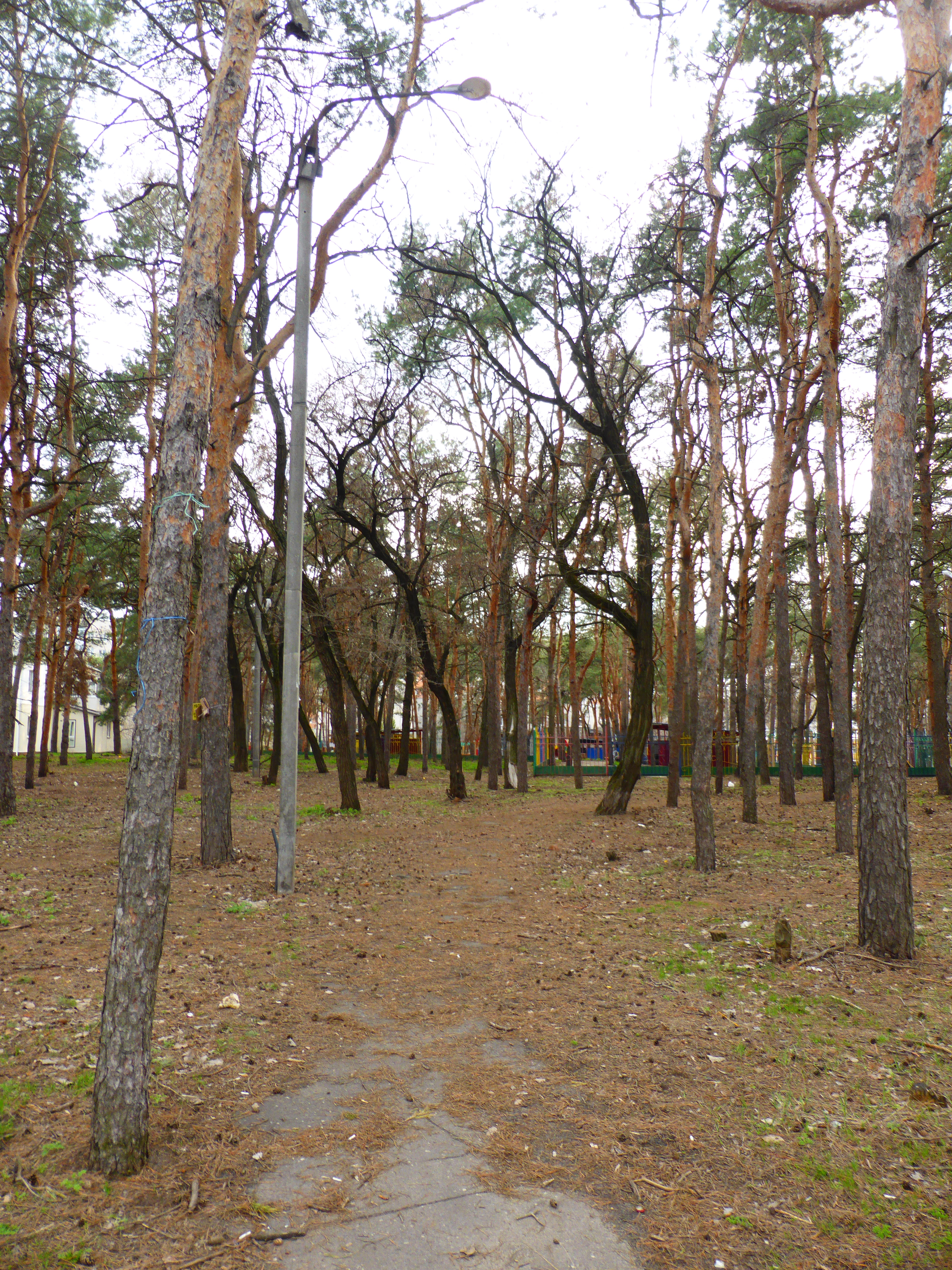 Сквер Лесная сказка: улица Богдана Хмельницкого, 26Д, Воронеж, Воронежская область This image is related to the protected area of Russia number 3620017